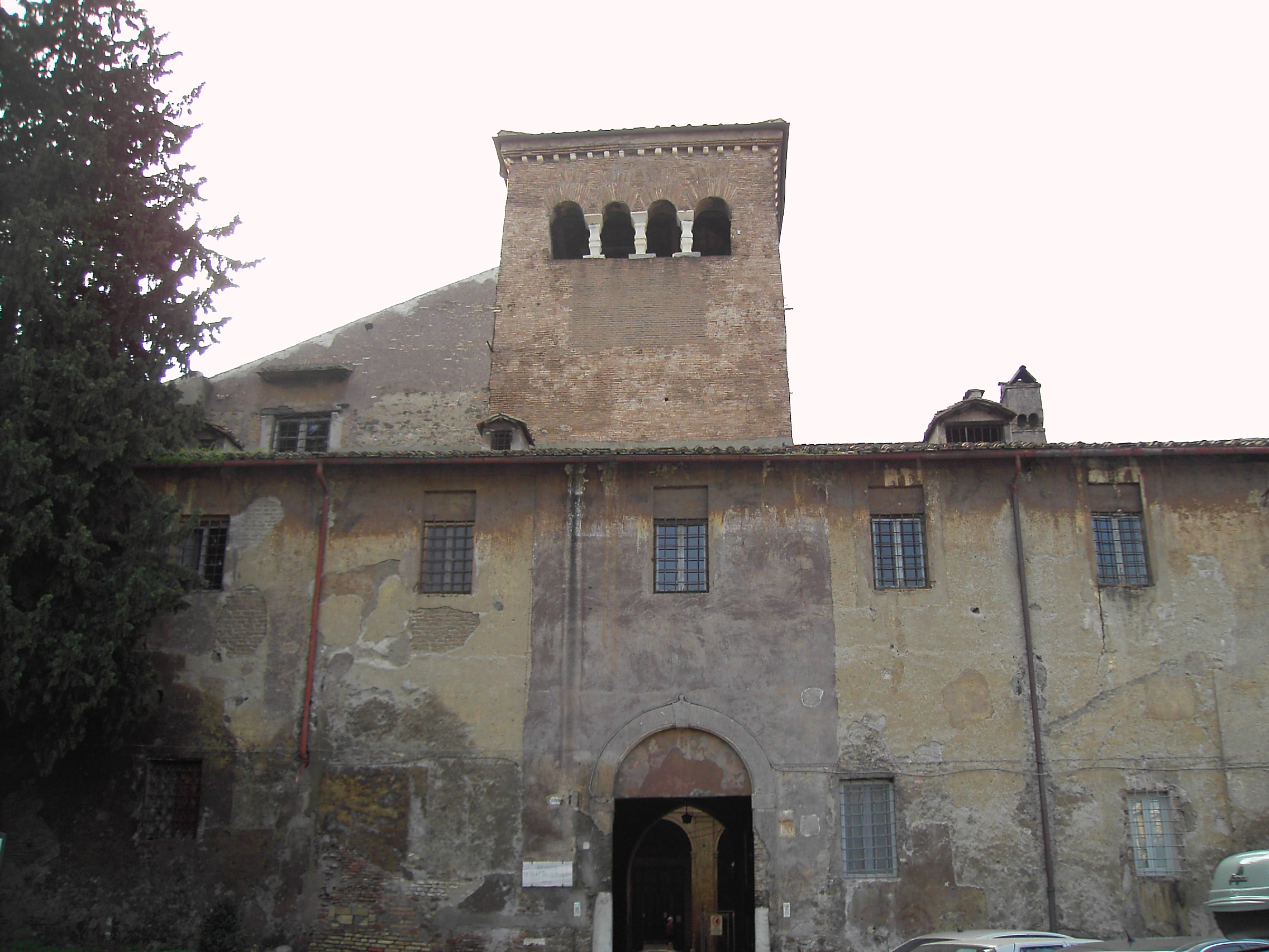 Roma, Santi Quattro Coronati, Ingresso by Lalupa